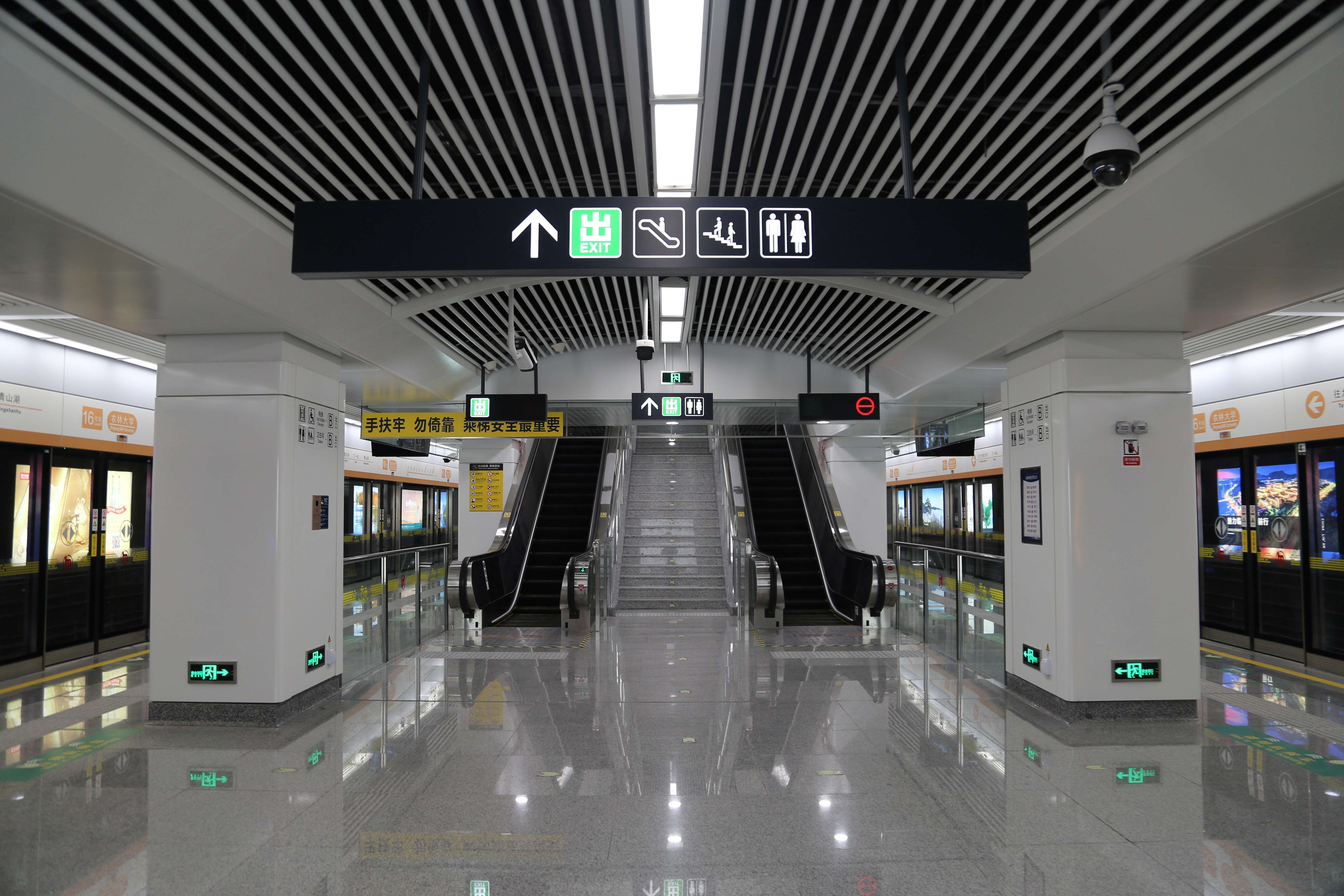 农林大学站站台